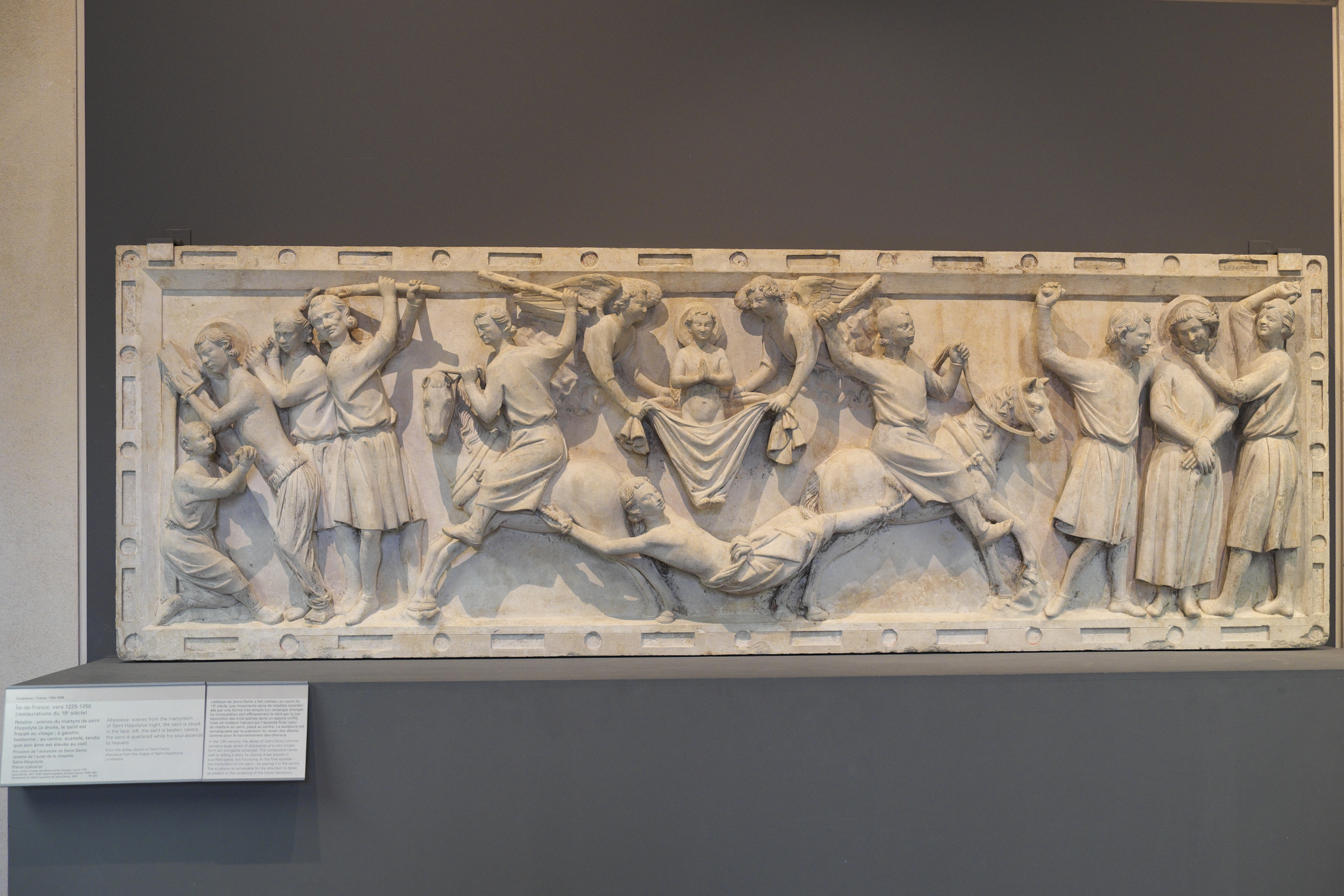 Altarretabel im Museum des Louvre in Paris (Île-de-France/Frankreich), um 1225 bis 1250; Darstellung: Martyrium des heiligen Hippolyt von Rom